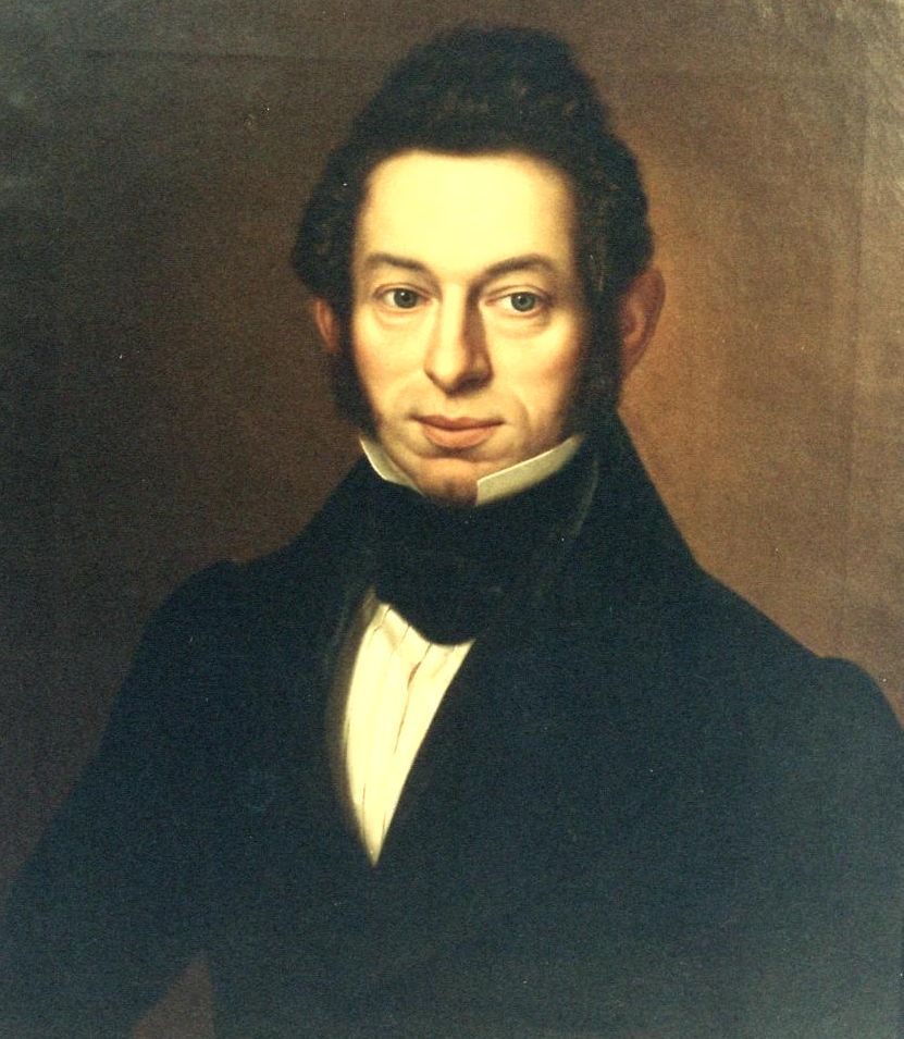 Johann Velten: "Portrait eines unbekannten Herren", Öl auf Leinwand, 61,5 x 53,5 cm, Stadtmuseum Simeonstift Trier